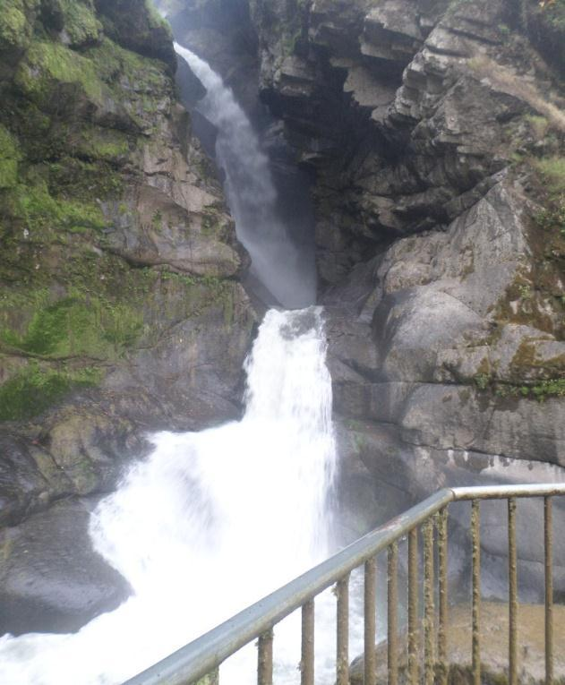 Turismo por Huigra, atractivo natural, la cascada del Angas.